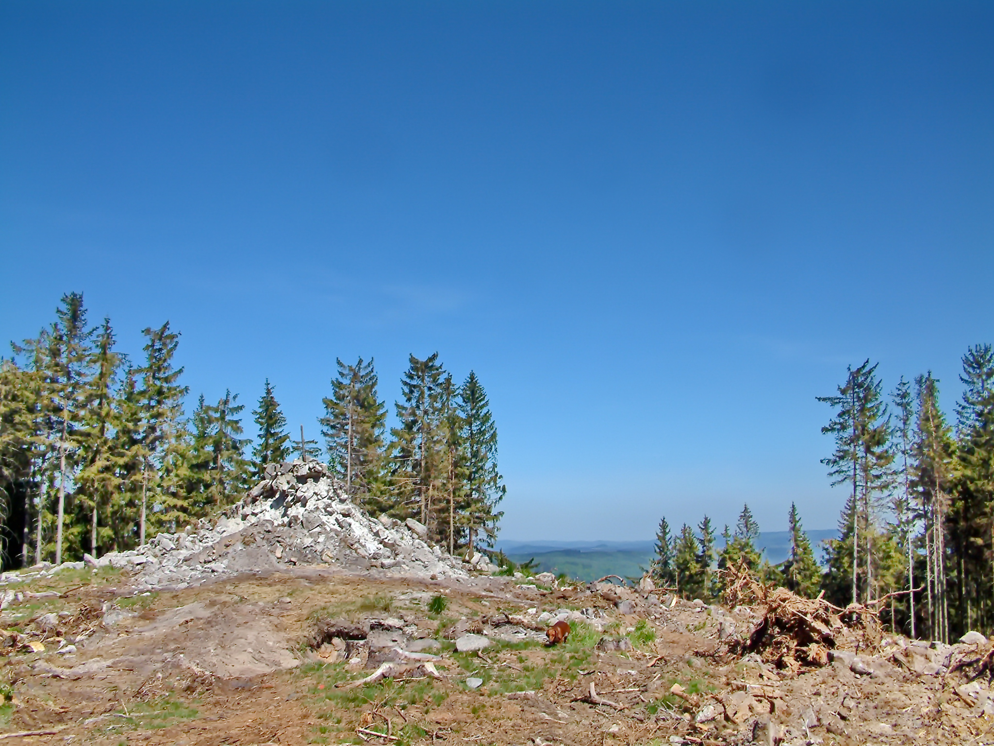 Zbořeniště krudumské rozhledny (Aussichtsturm Krudum - Ruine) 30.04.2007